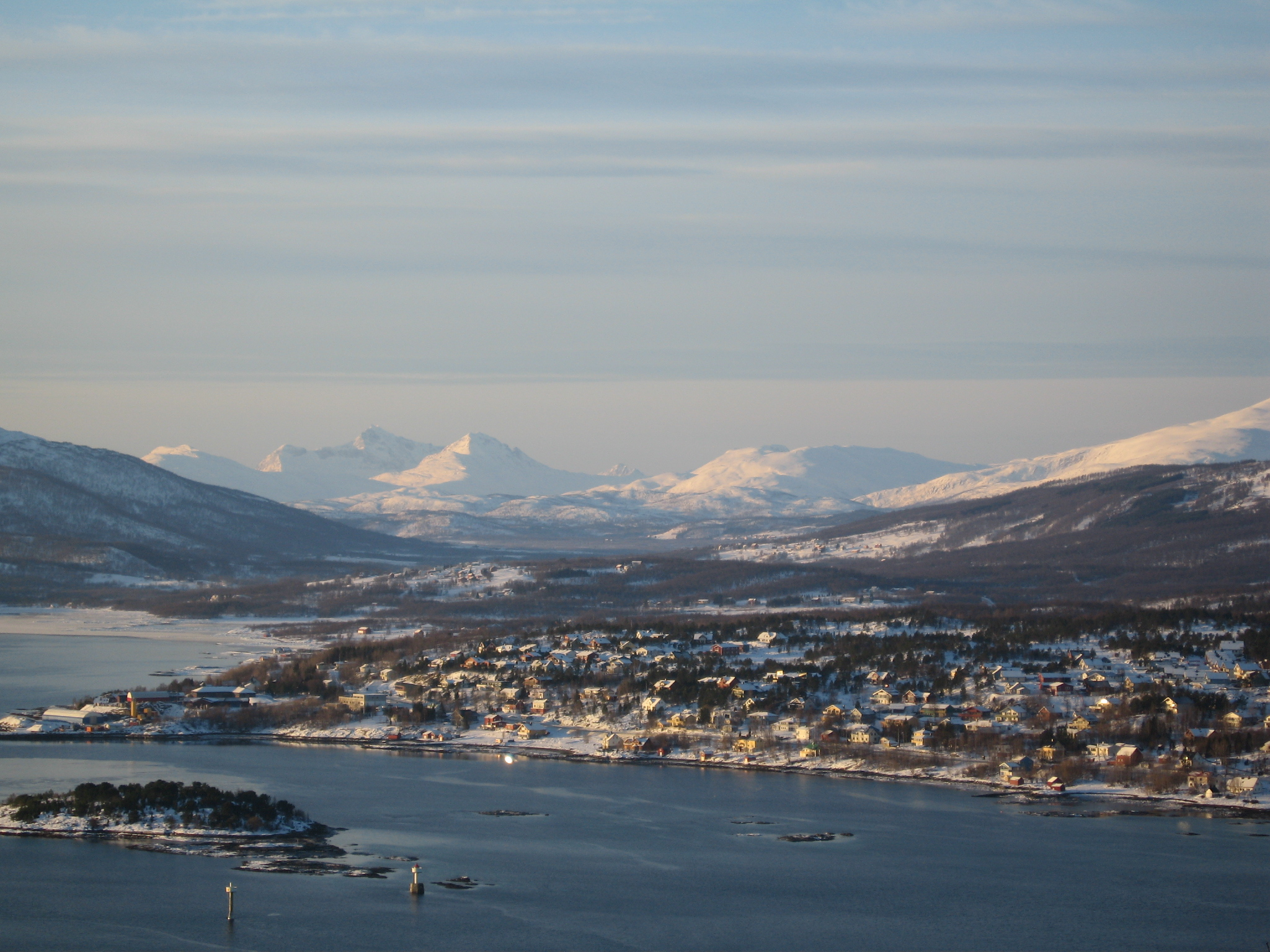 Blick von Nordosten auf Silsand auf Senja, Kommune Lenvik; vorn links die kleine Insel Laukhelløya in Gisund